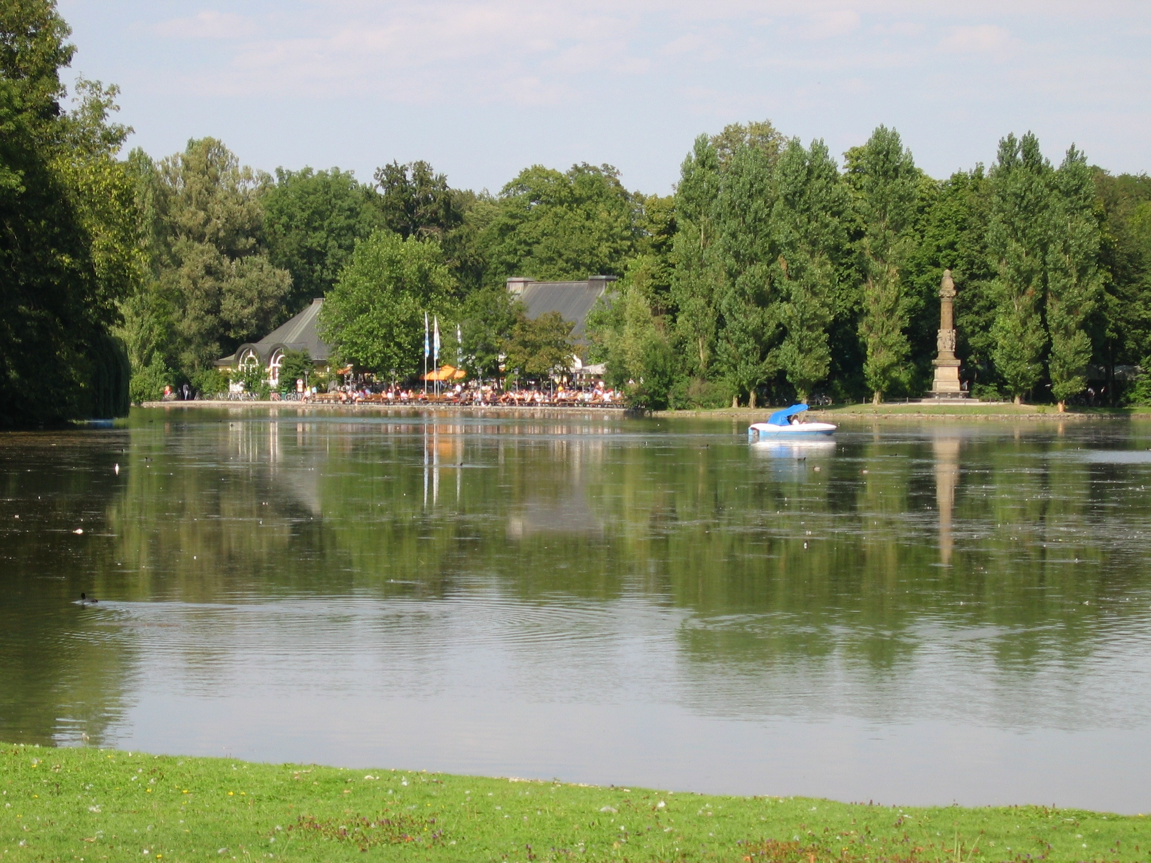 Englischer Garten München. Kleinhesseloher See mit Denkmal für Friedrich Ludwig von Sckell und Biergarten Seehaus.